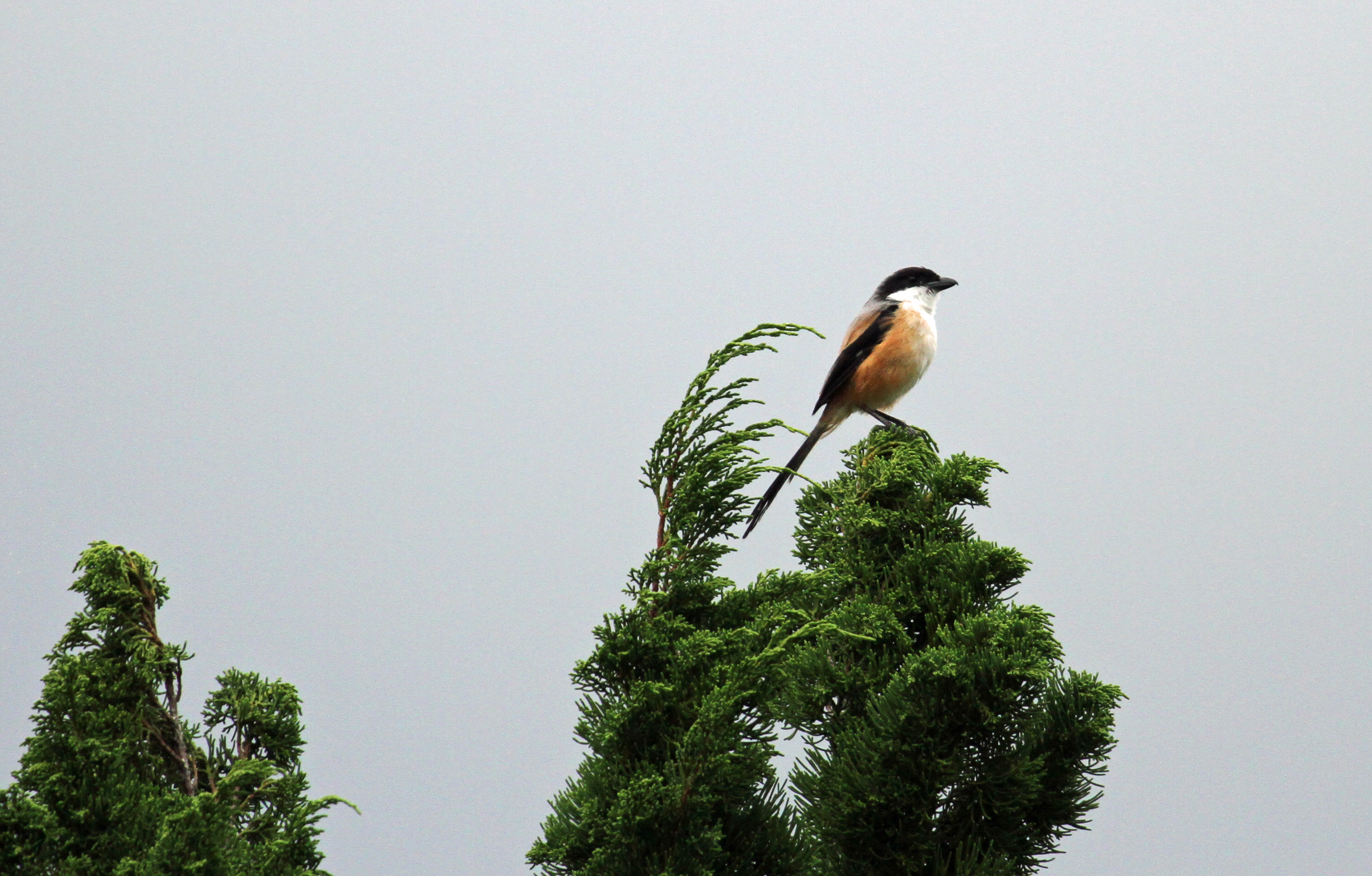 Pie-grièche scharch à Bali